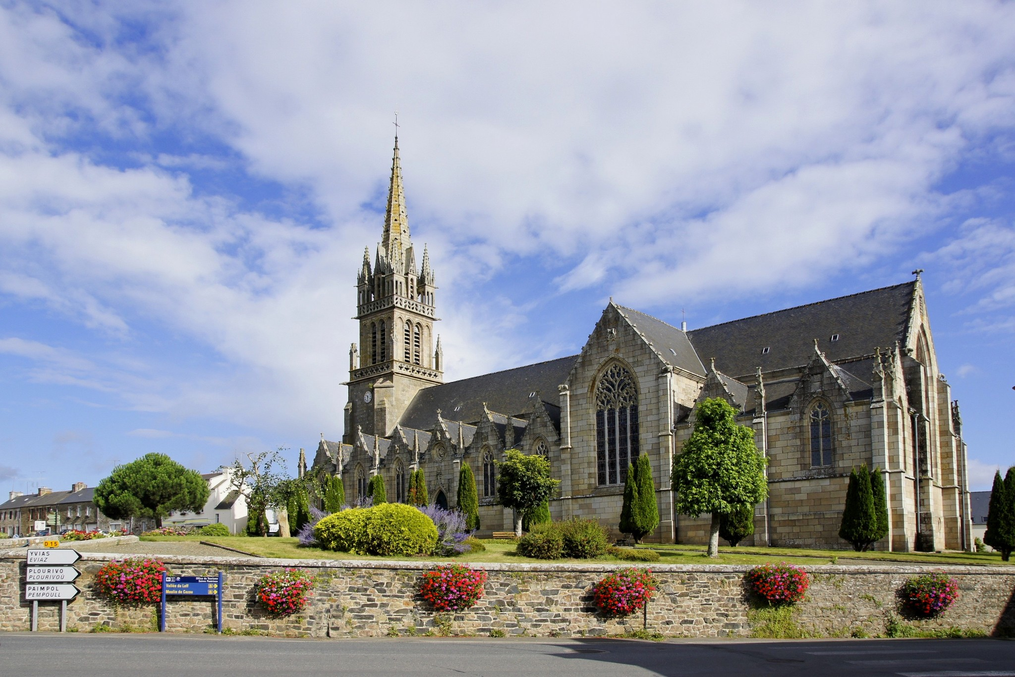 Belle Eglise Bretonne .